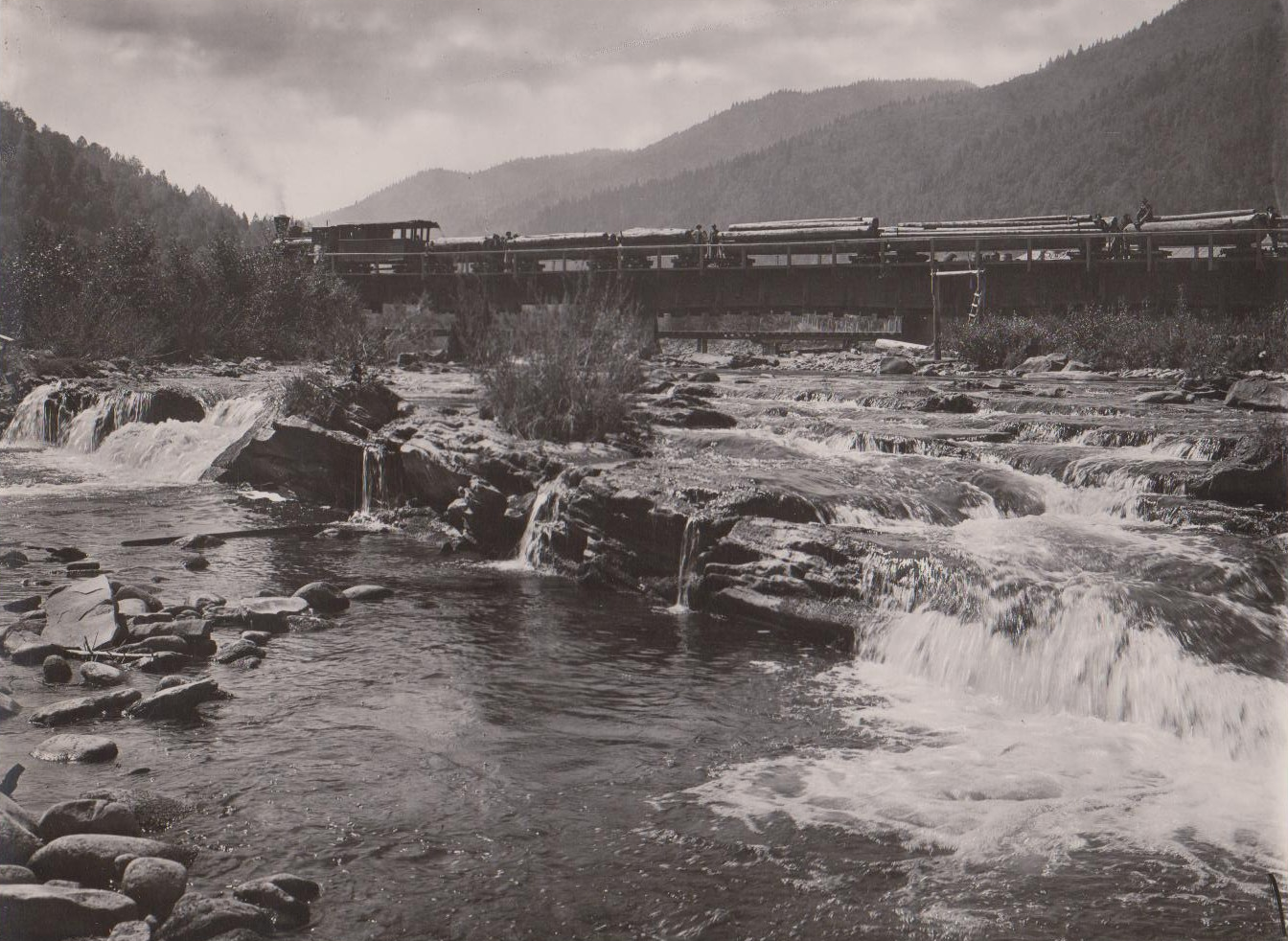 Tren transportând buşteni spre fabrica din Tarcău